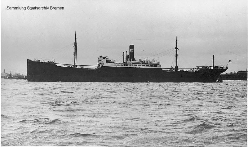 Der Frachter OCKENFELS der DDG Hansa 1910